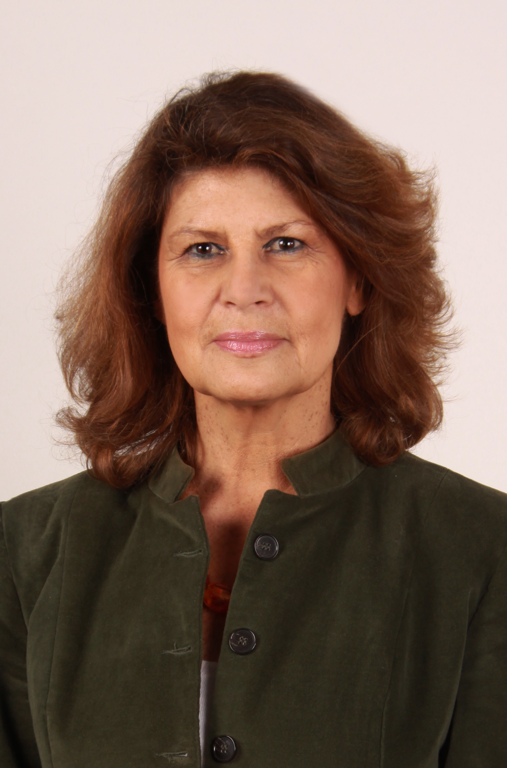 Abgeordnete/r Europaparlament